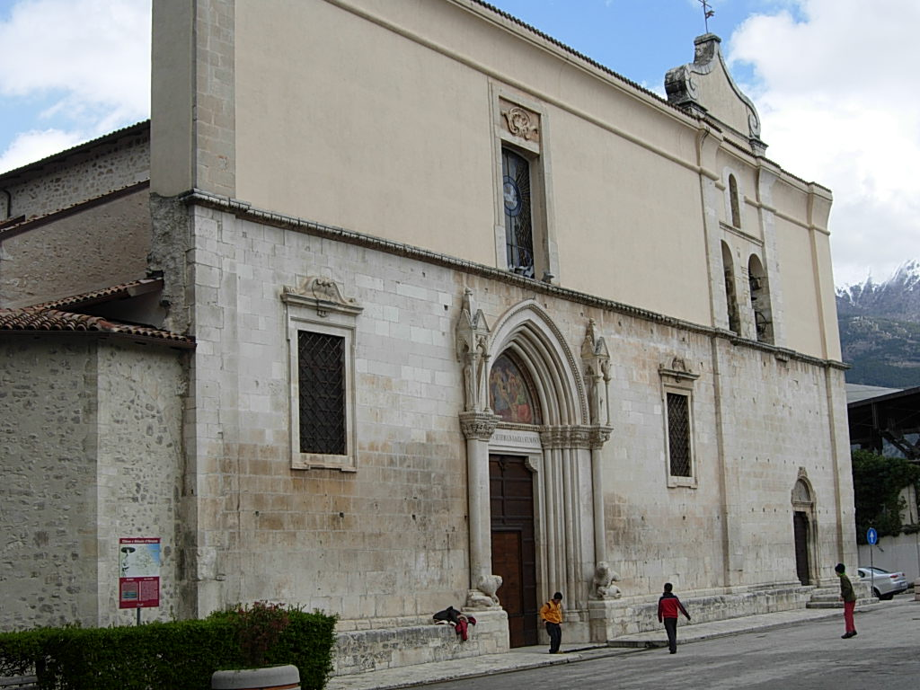 Cattedrale di San Panfilo in Sulmona (AQ) Foto personale concessa in PD